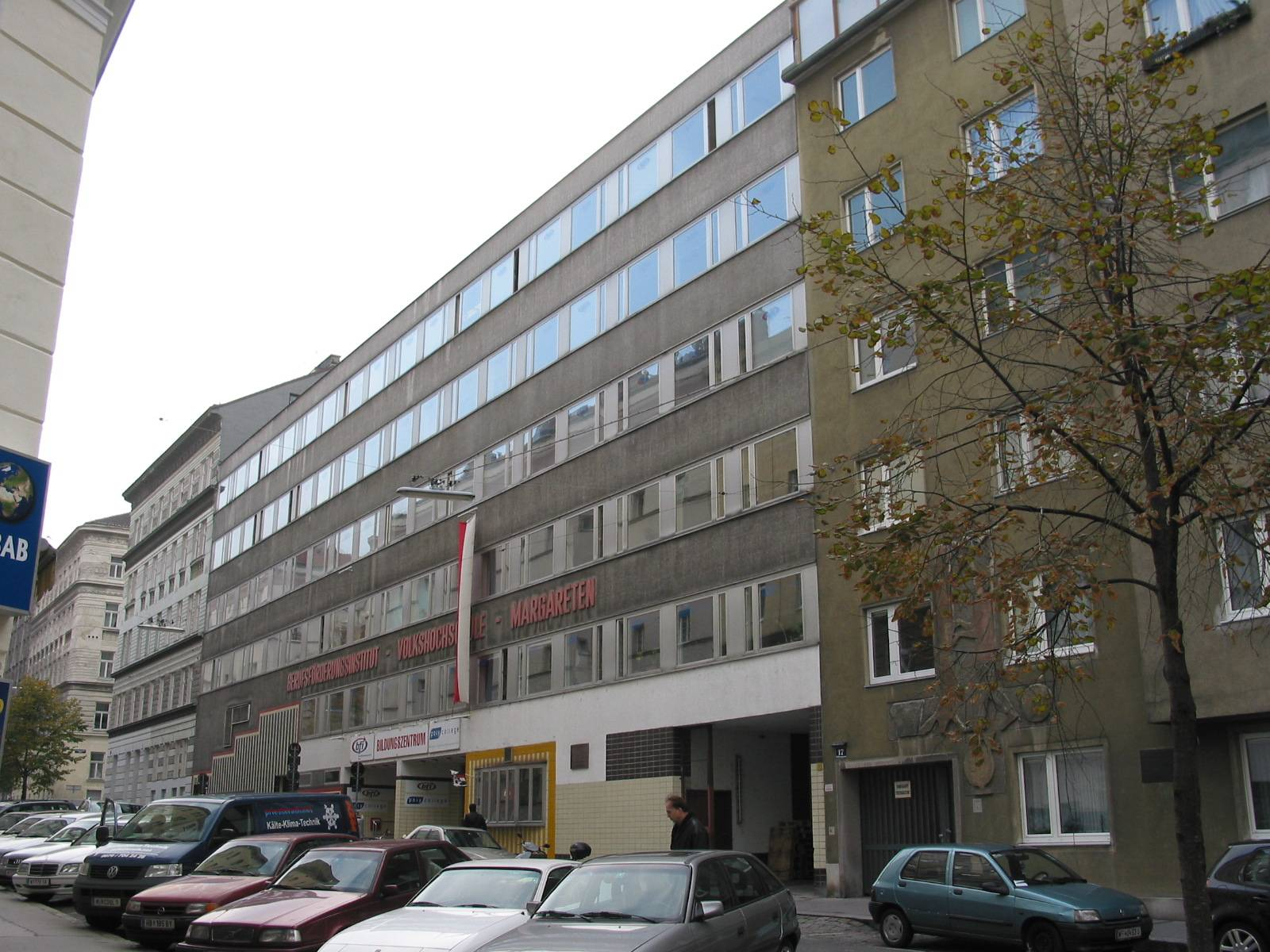 Polycollege Stöbergasse, Volkshochschule en: Adult education center polycollege Stöbergasse